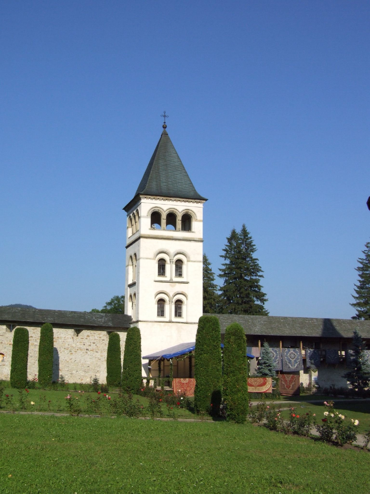 Putna -16.08.2007